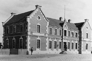 Swedish railway station Halmstad Östra, Halmstad-Bolmens Järnväg